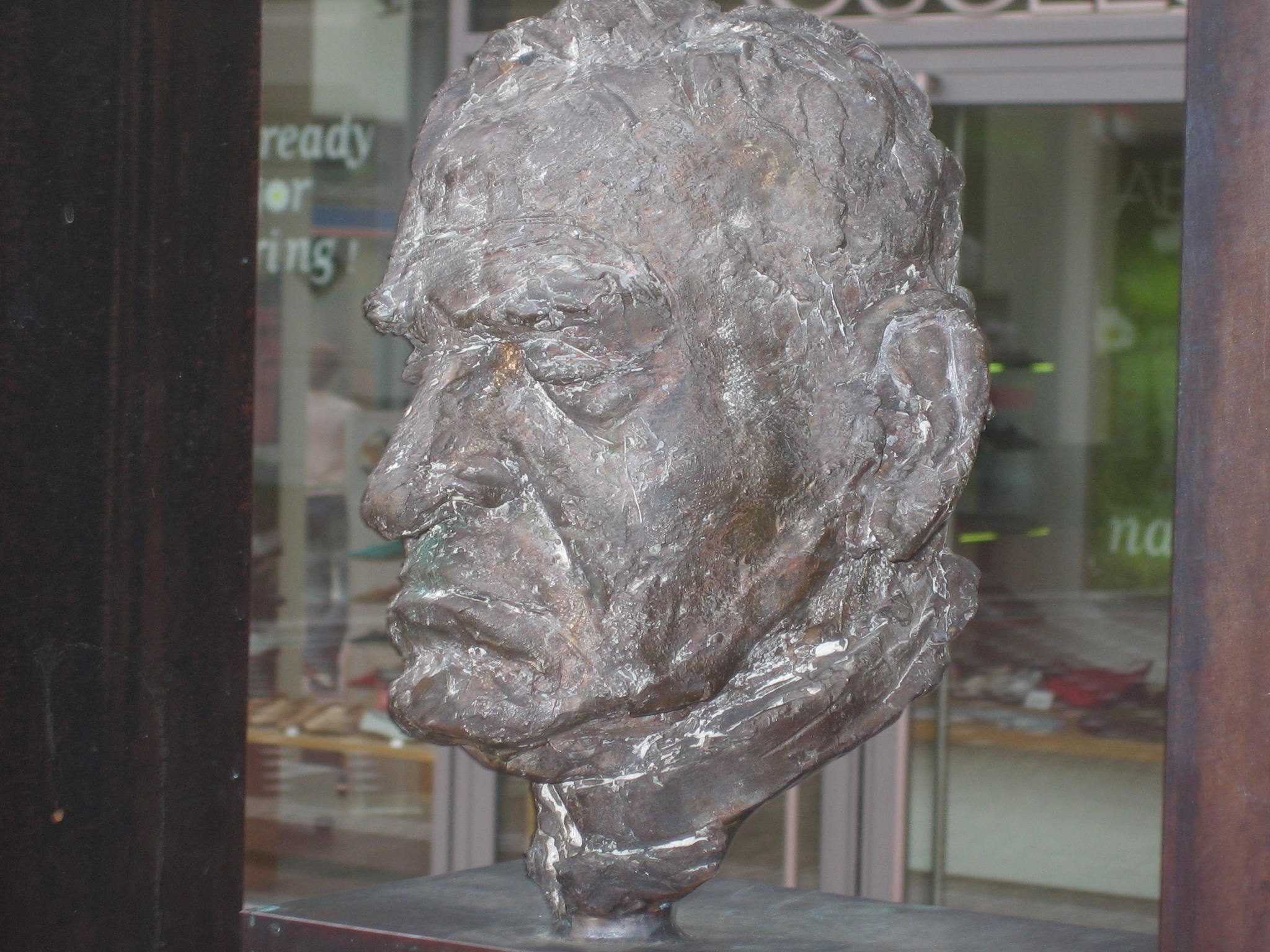 Kardinal Volk nach einer Plastik von Oswald